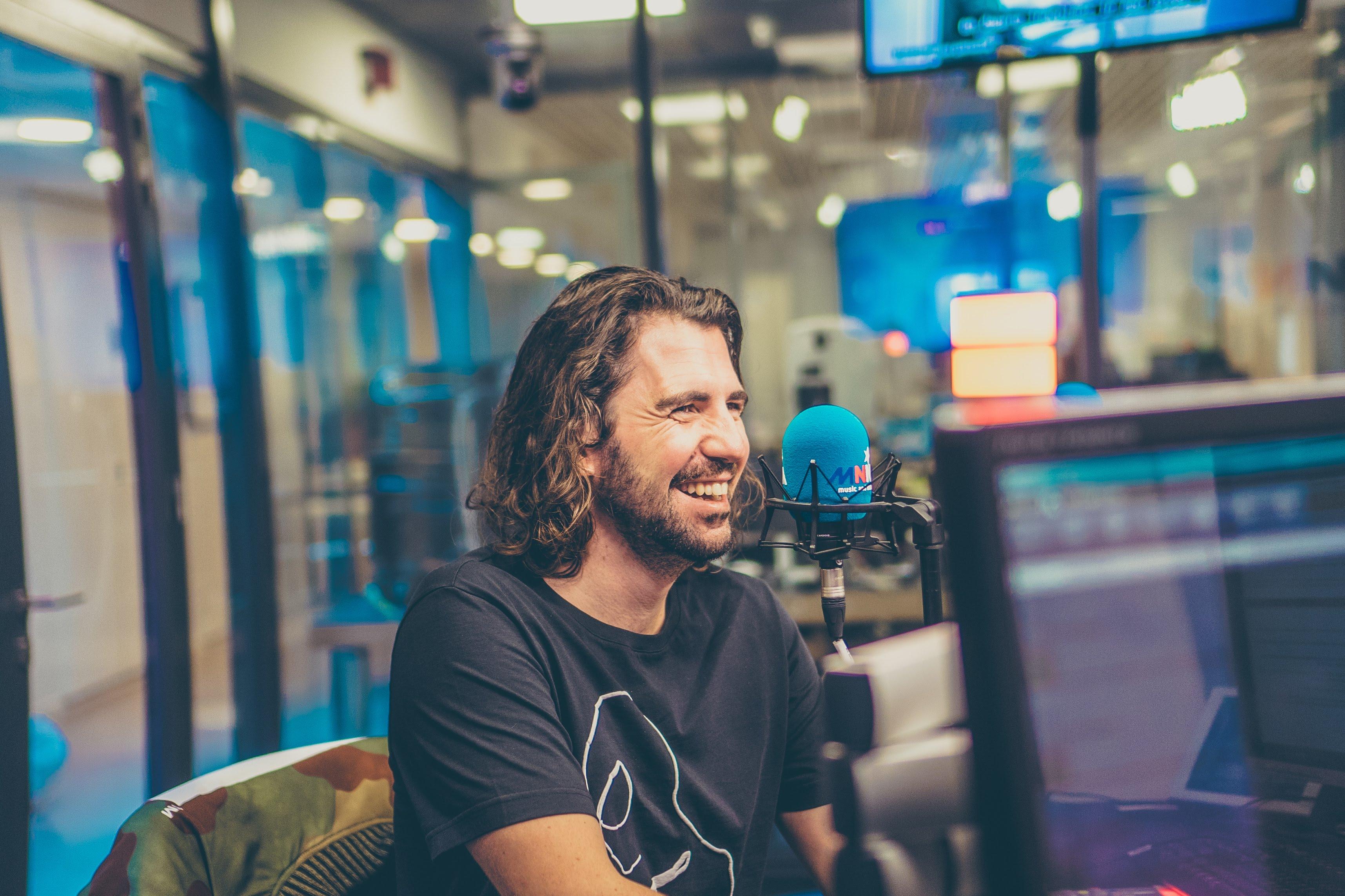 Dimitri Thivaios in de studio van MNM